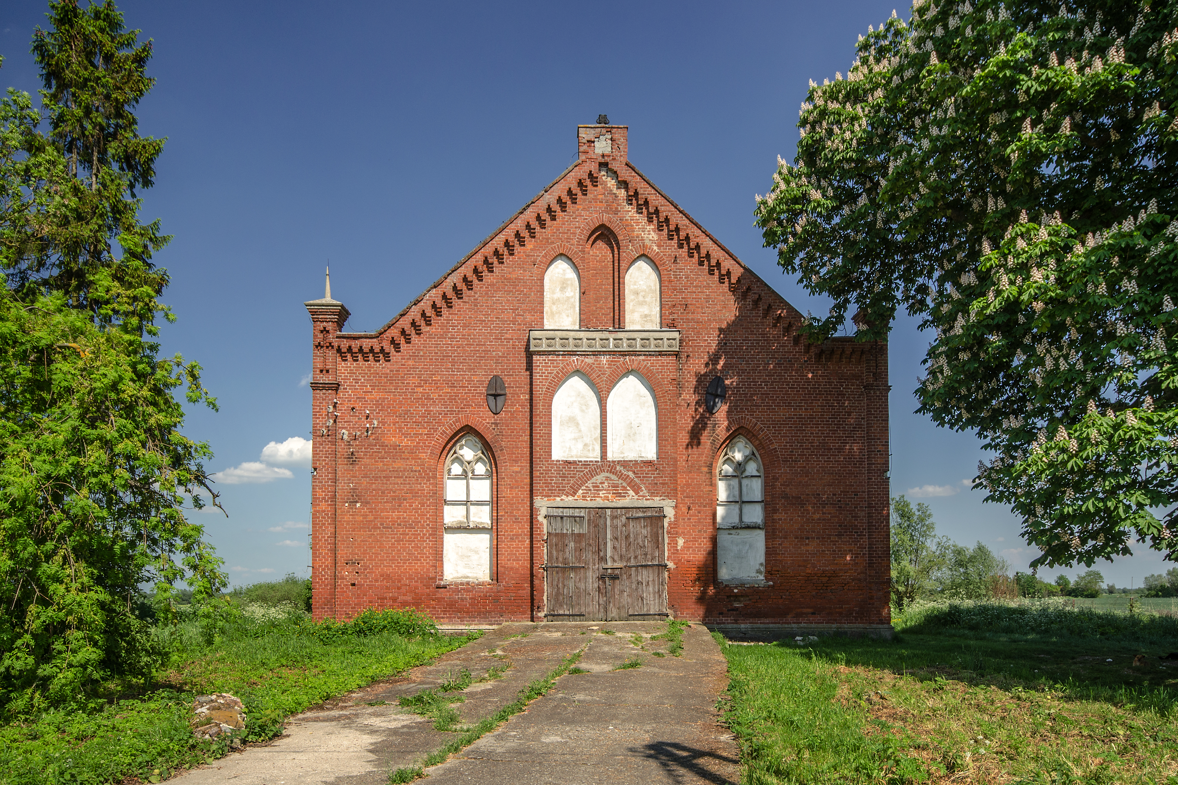 Jezioro (woj warmińsko-mazurskie), zbór mennonicki